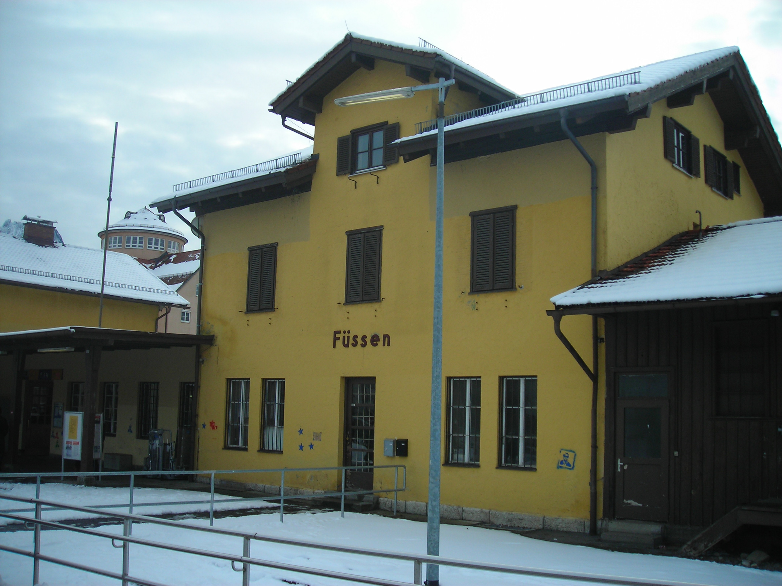 A Biessenhofen–Füssen vasútvonal végállomása: Füssen